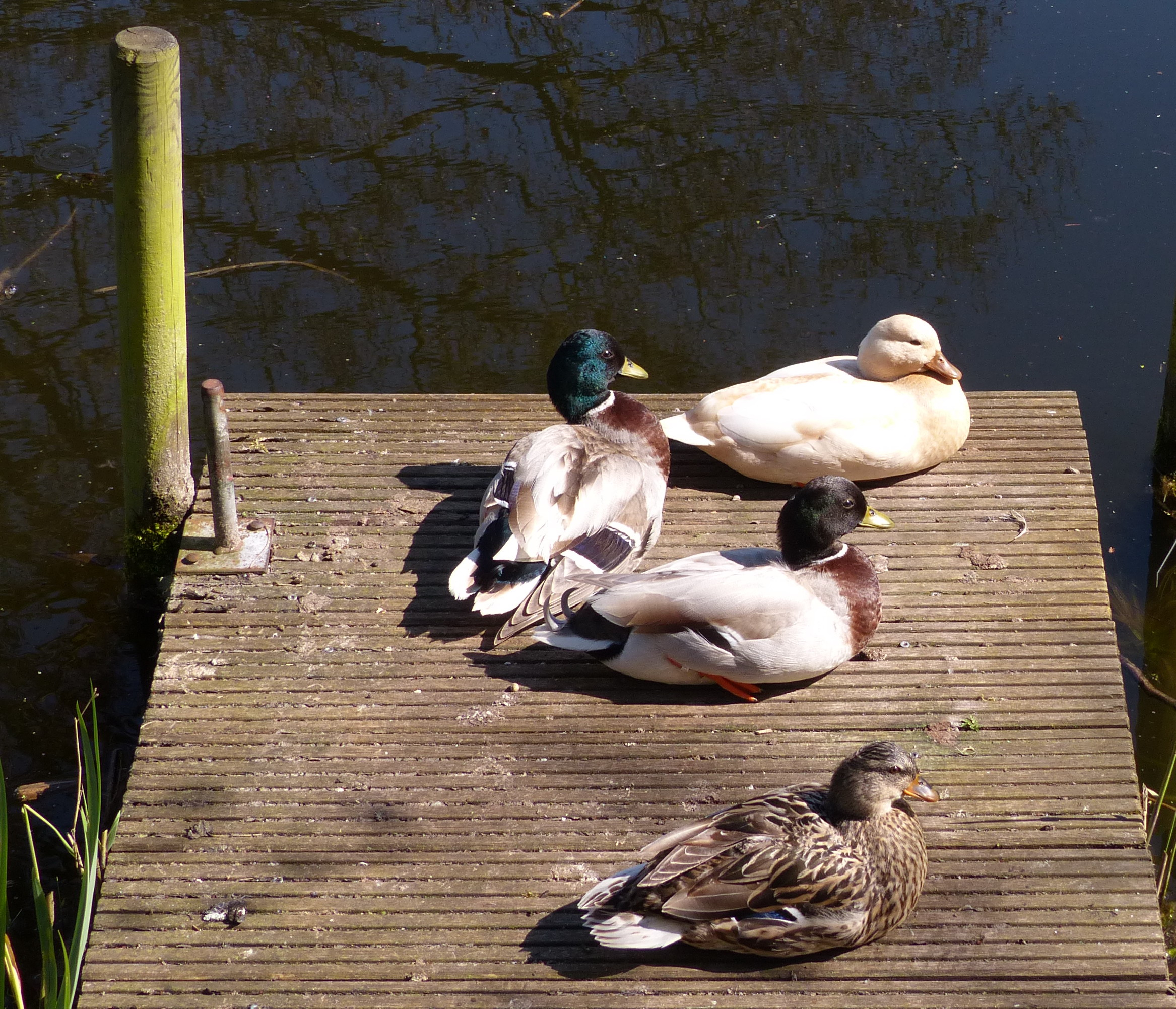 Hollandse kwakertjes Tuin van Kapitein Rommel